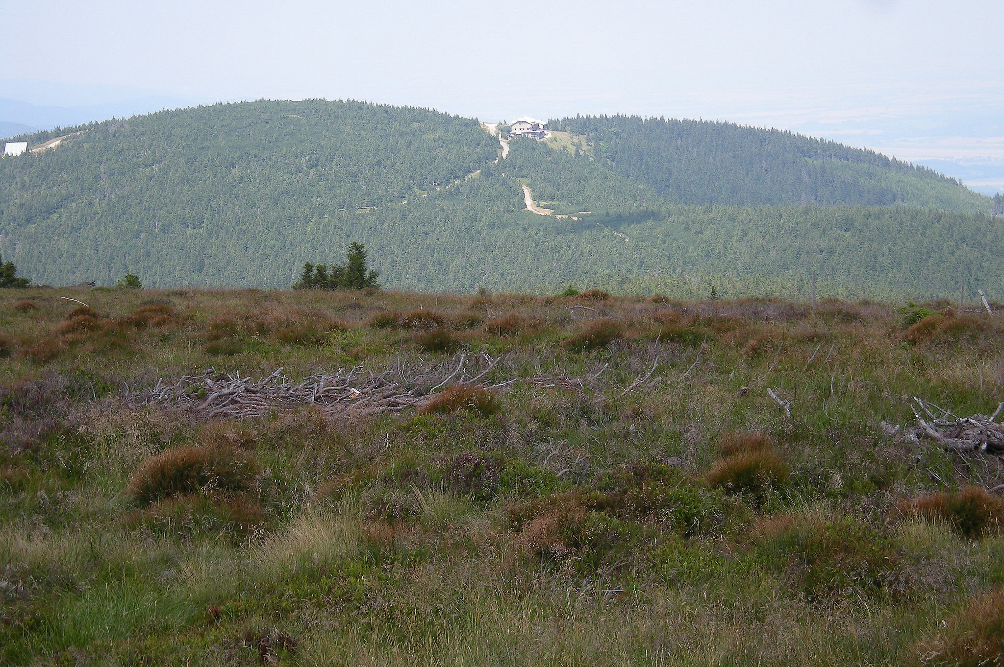 Roślinność na Keprniku w oddali Szerak, z prawej schronisko, z lewej stacja kolei linowej.